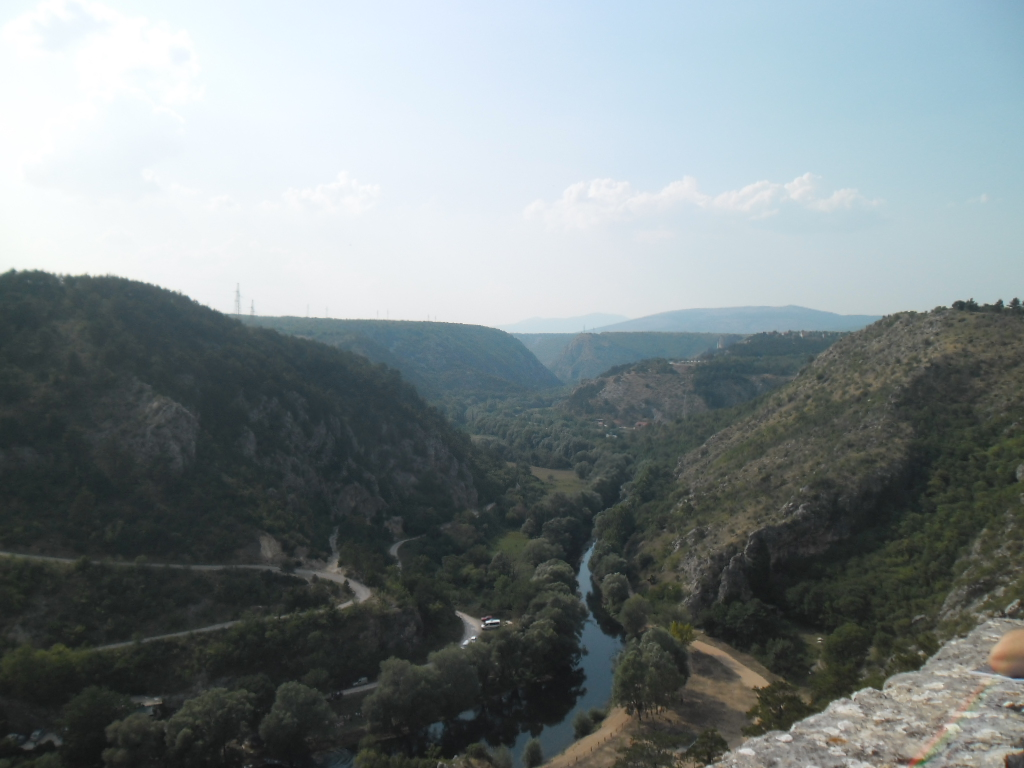 proslava Dana pobjede i domovinske zahvalnosti (20. obljetnice vojno-redarstvene operacije Oluje) u Kninu 5. kolovoza 2015.